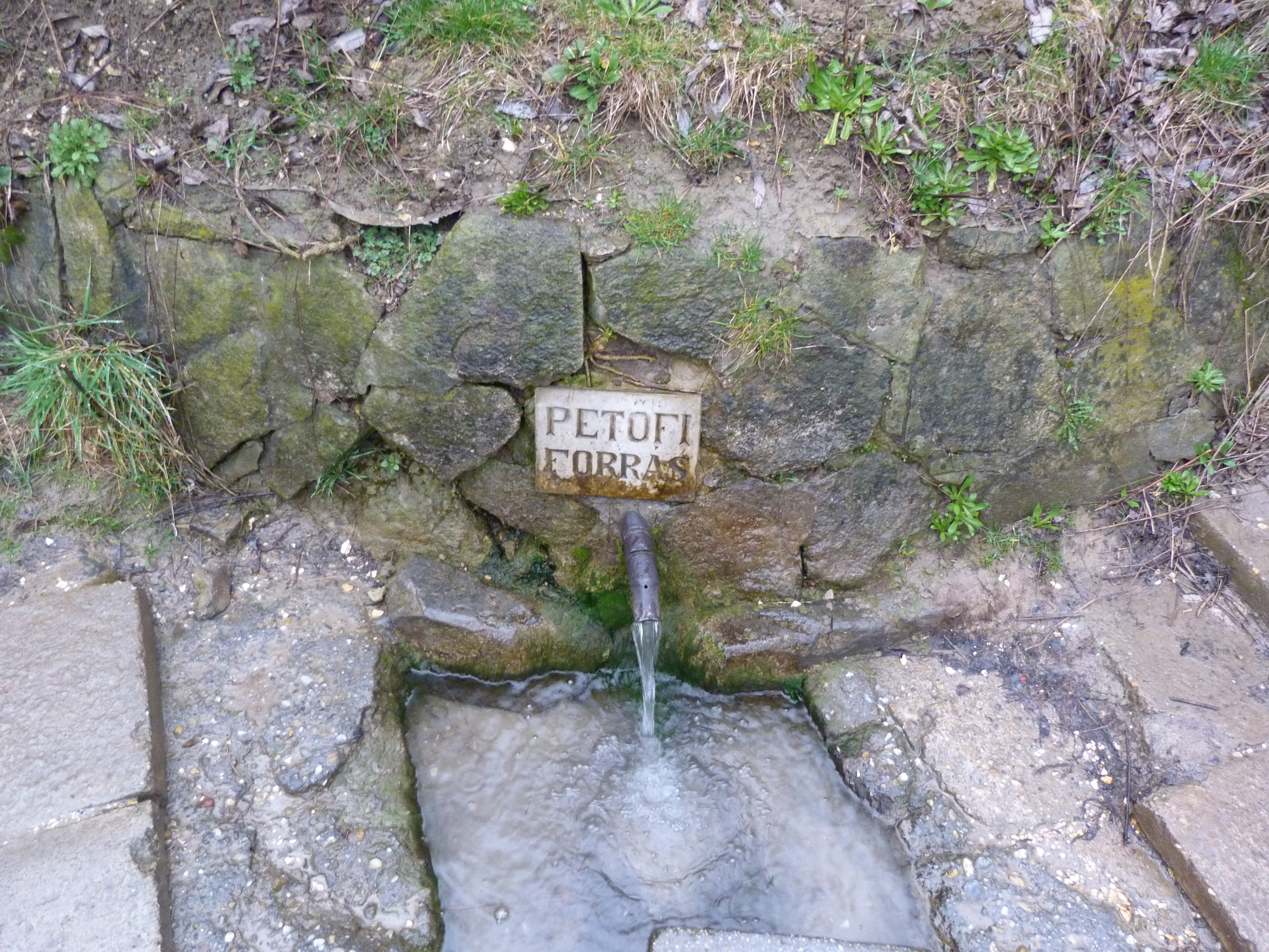 A felvételek 2014. február 28 –án készültek Bagon, a Petőfi forrásnál. A Petőfi forrás a 3 –as út 39-es km szelvényéhez közel Gödöllő és Aszód között van, a Csintó Szálloda mellett. Bag külterület, Csintovány dűlő. A hagyomány szerint Petőfi Sándor Aszódról Gödöllőre gyalogolva itt oltotta szomját.. Koordináták: 47° 38' 7.764" N, 19° 28' 55.5744" E Régen a forrás felett vezetett a Császárút, még korábban a Budai ó út.